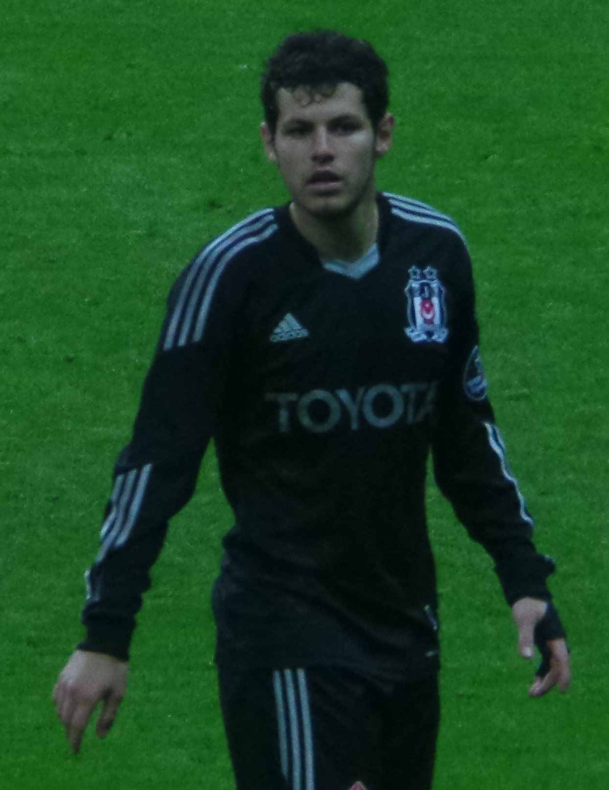 Pedro Franco'14